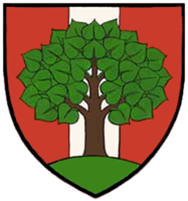 blazono de Nöchling, ĝis nun manka en vikipedio